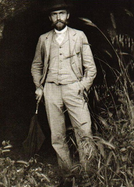 (?? Self-portrait?